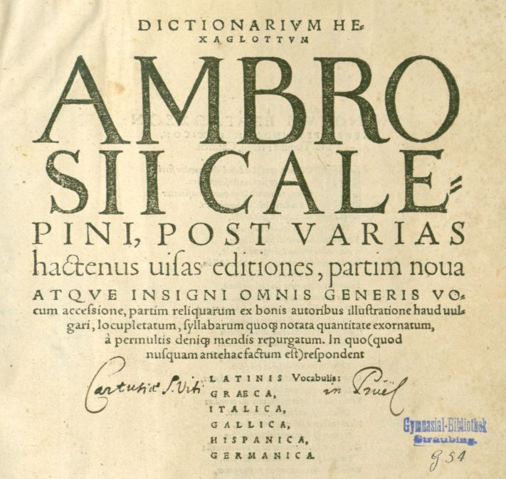 Titelseite eines Wörterbuchs aus der Bibliothek der Kartause Prüll, heute in der Straubinger Gymnasialbibliothek